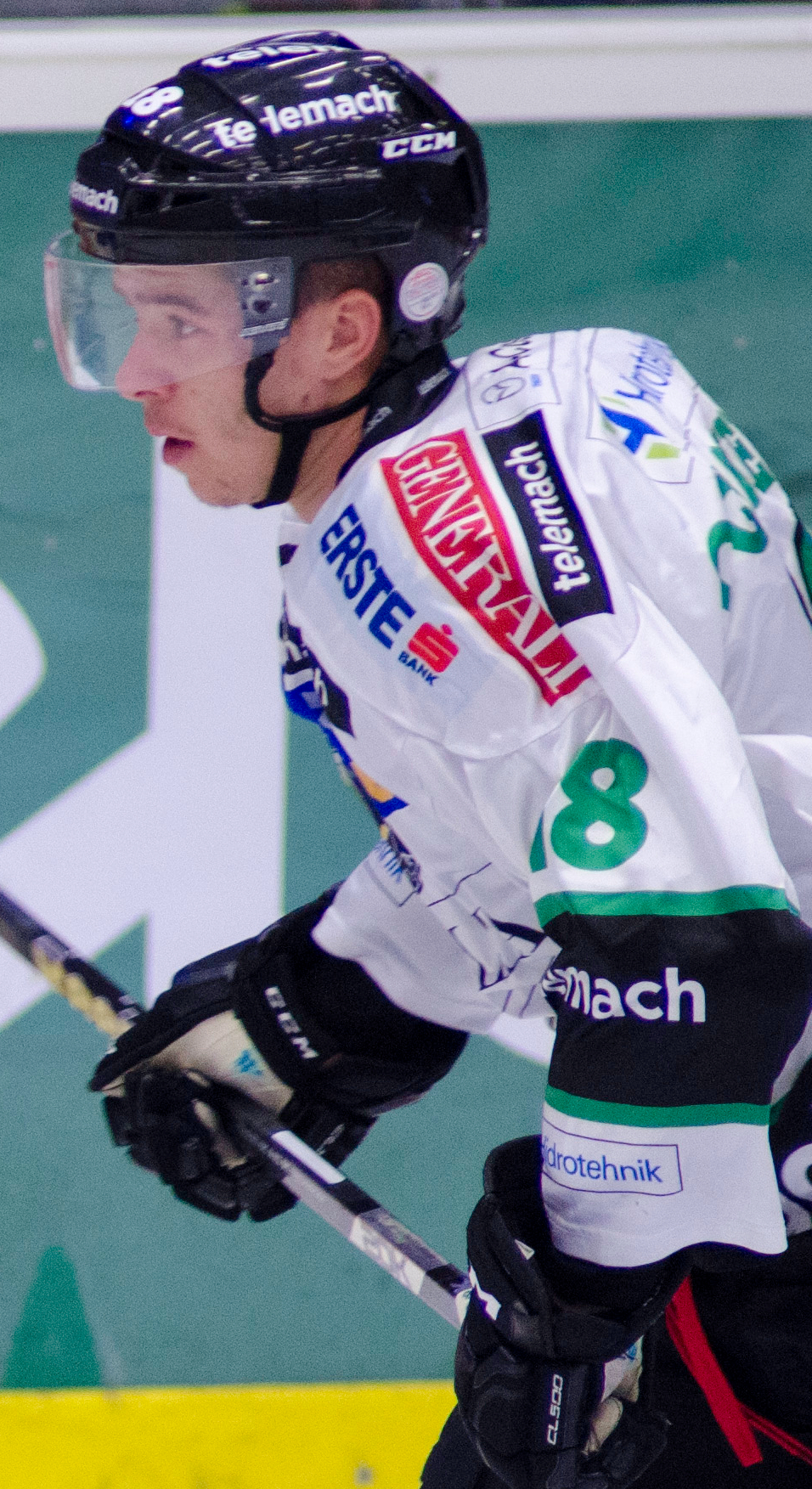 Ken Ograjenšek